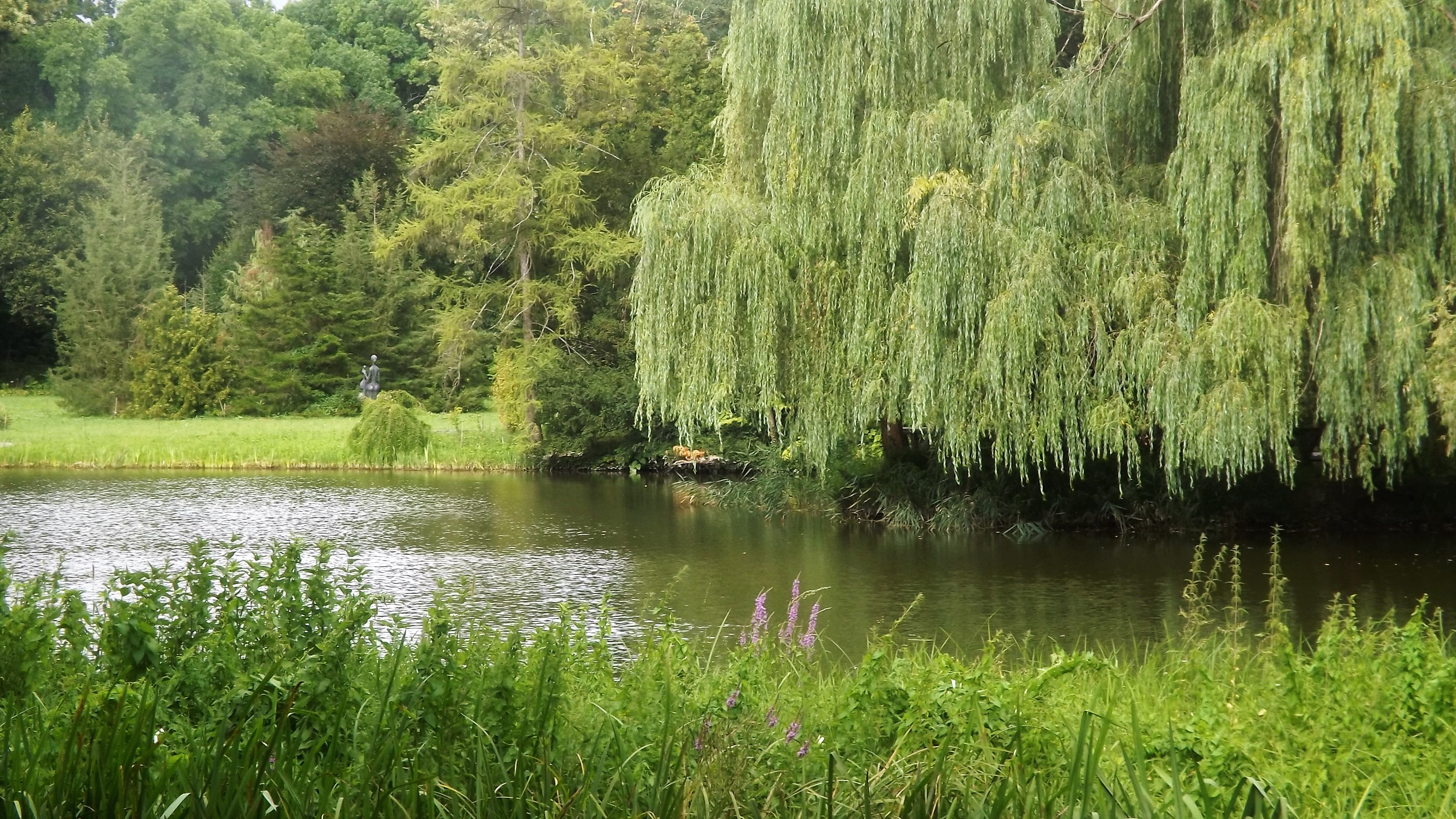 Vácrátóti botanikuskert